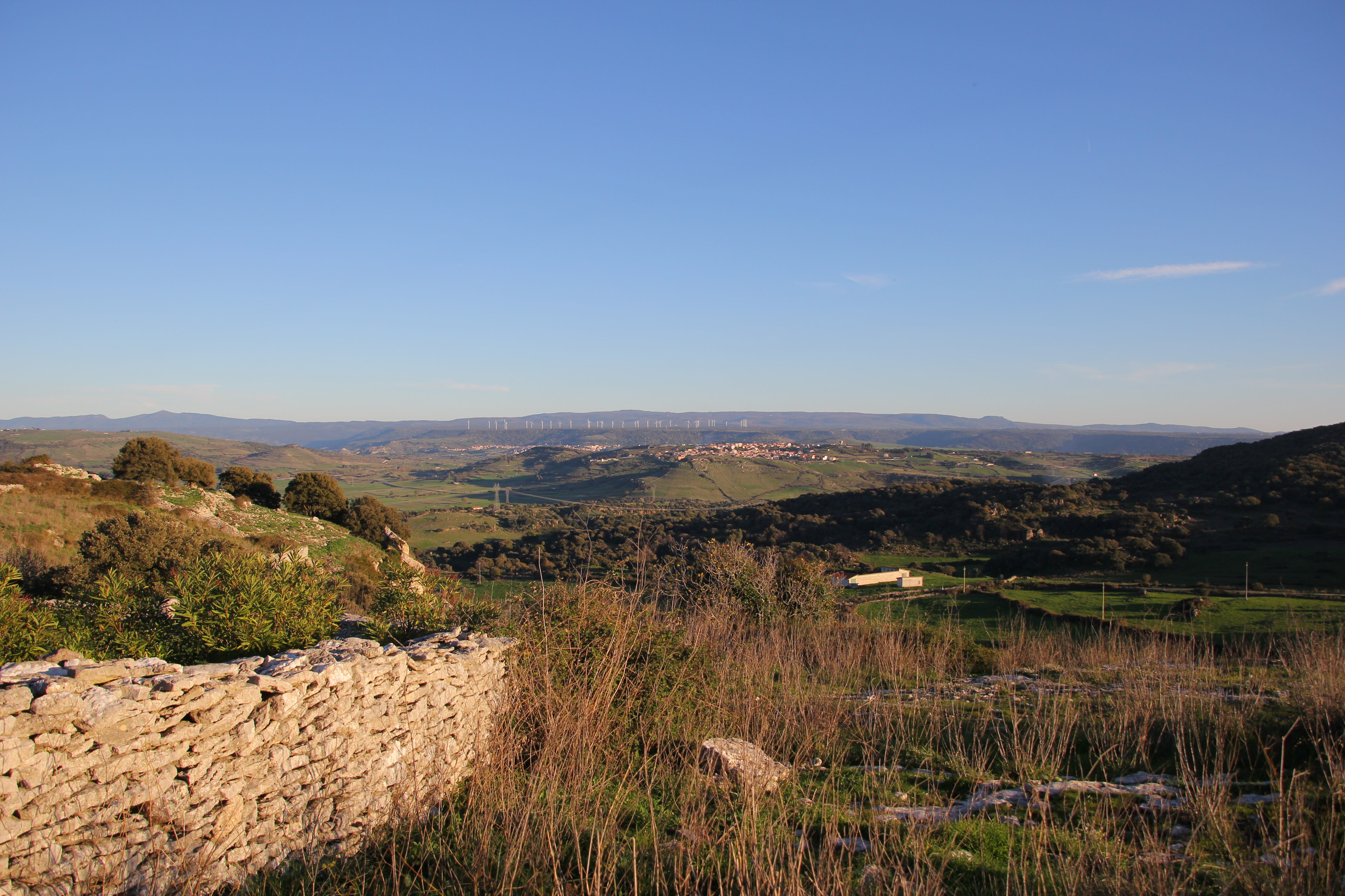 Meilogu